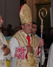 S. E. mons. Vincenzo Manzella celebra una S. Messa nella Cattedrale di Caltagirone